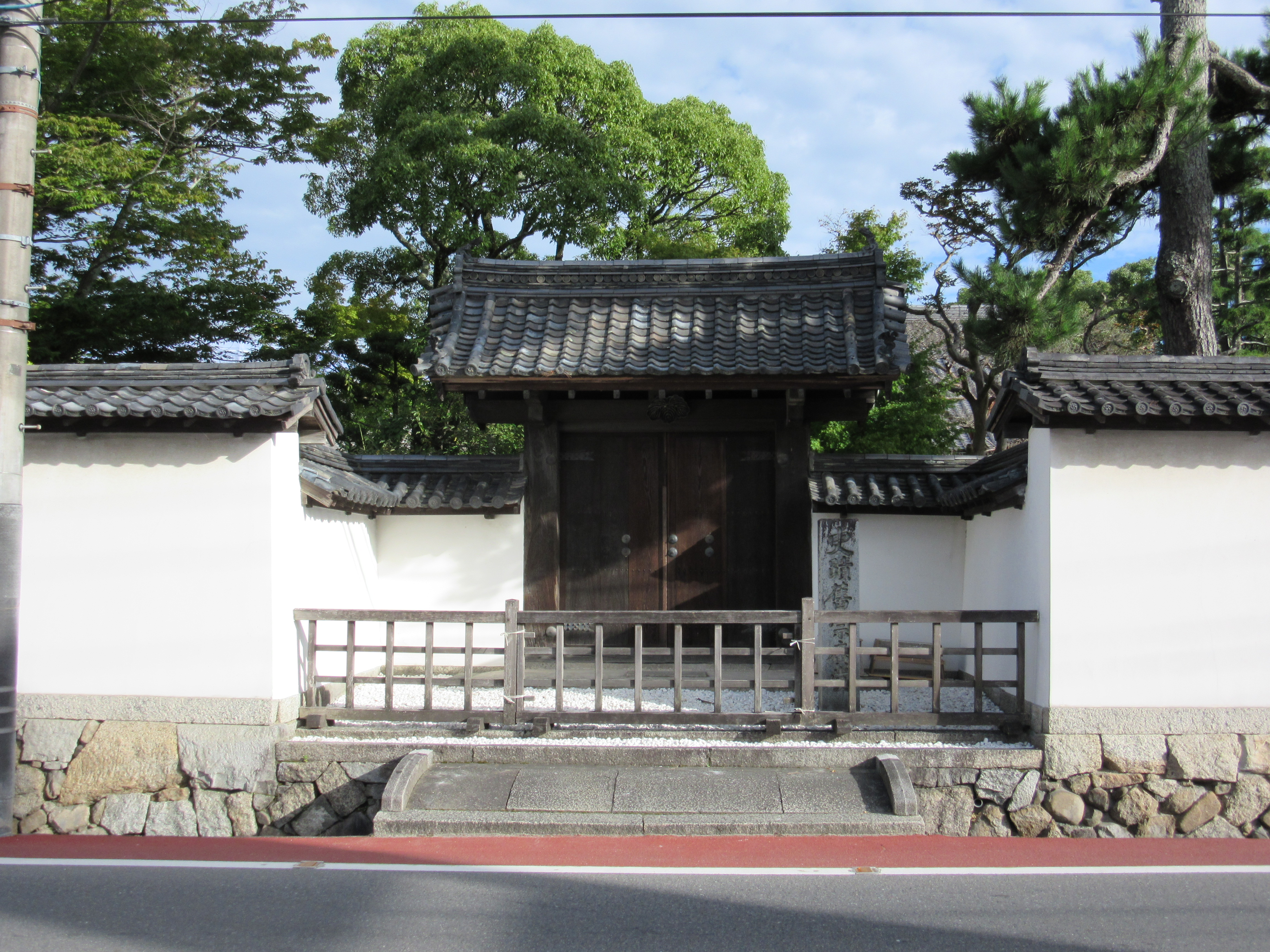 伊賀市の崇広堂